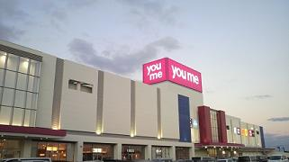 ゆめタウン徳島の写真。